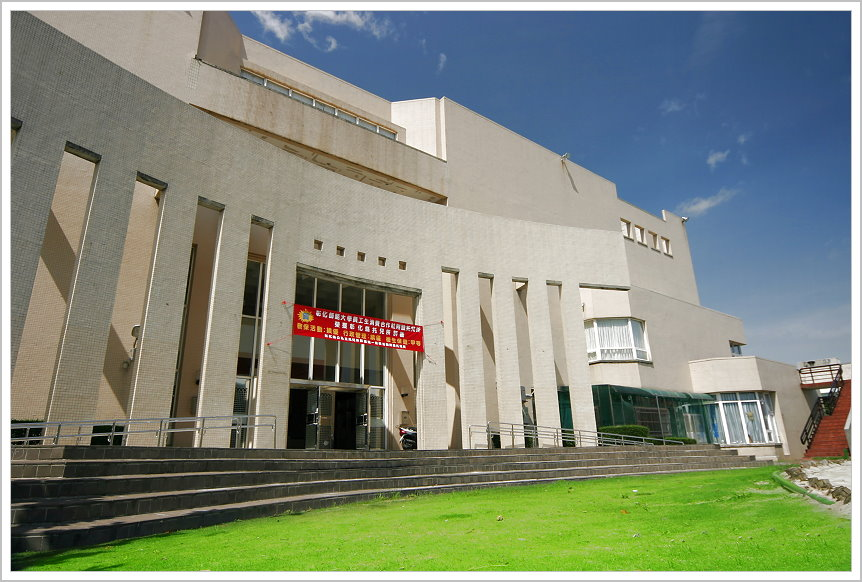 國立彰化師範大學綜合中心